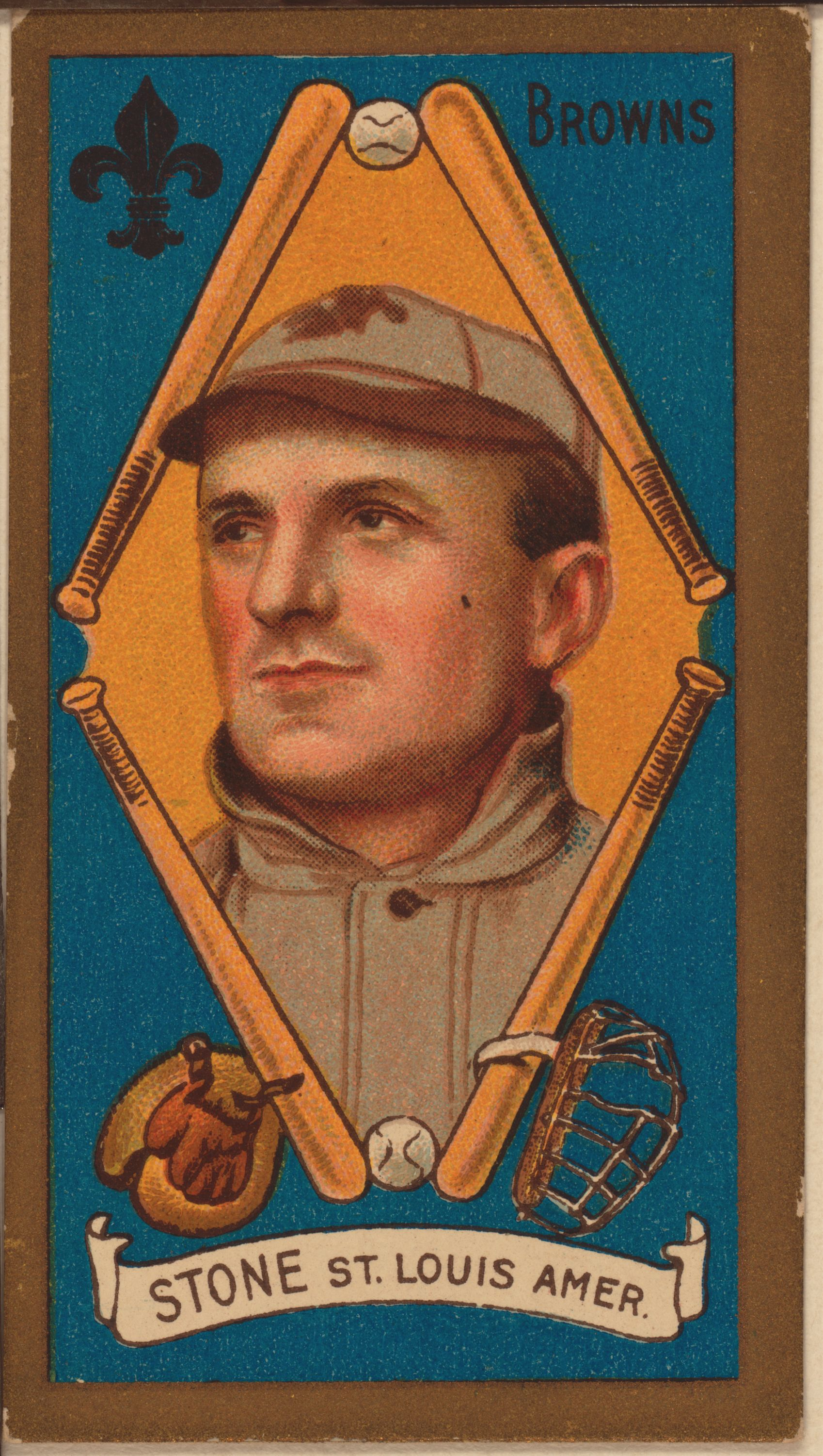 George Stone